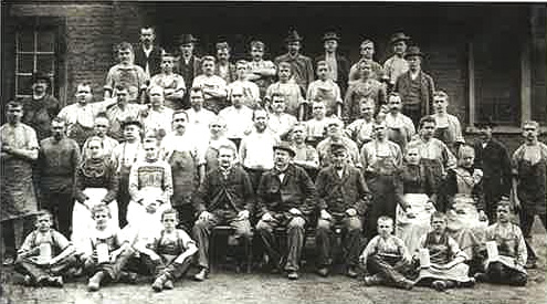 Mitarbeiter der RUD-Betriebsfamilie